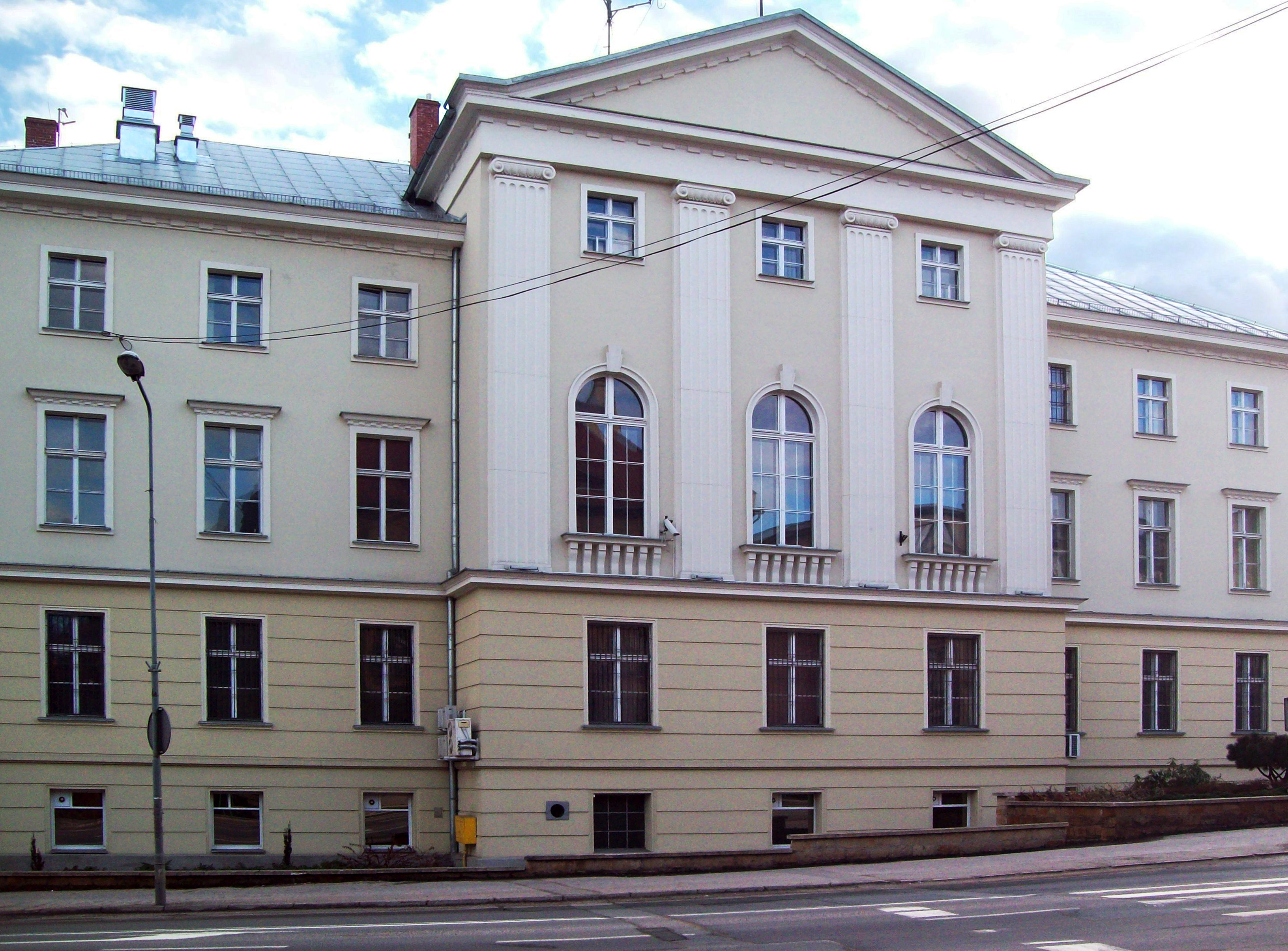 Starostwo Powiatowe w Kłodzku, widok od strony ul. Kościuszki.